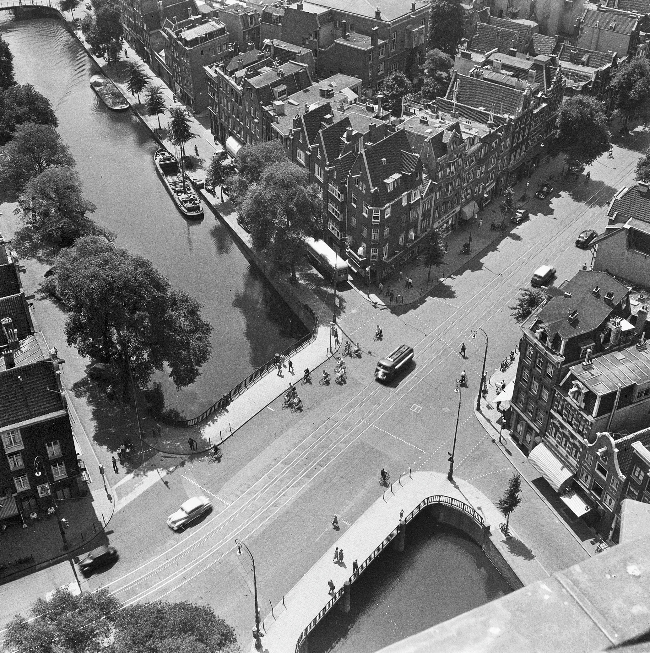 Plattegronden en overzichten: overzicht van af Westertoren naar het zuiden